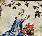 Jana Navarrská